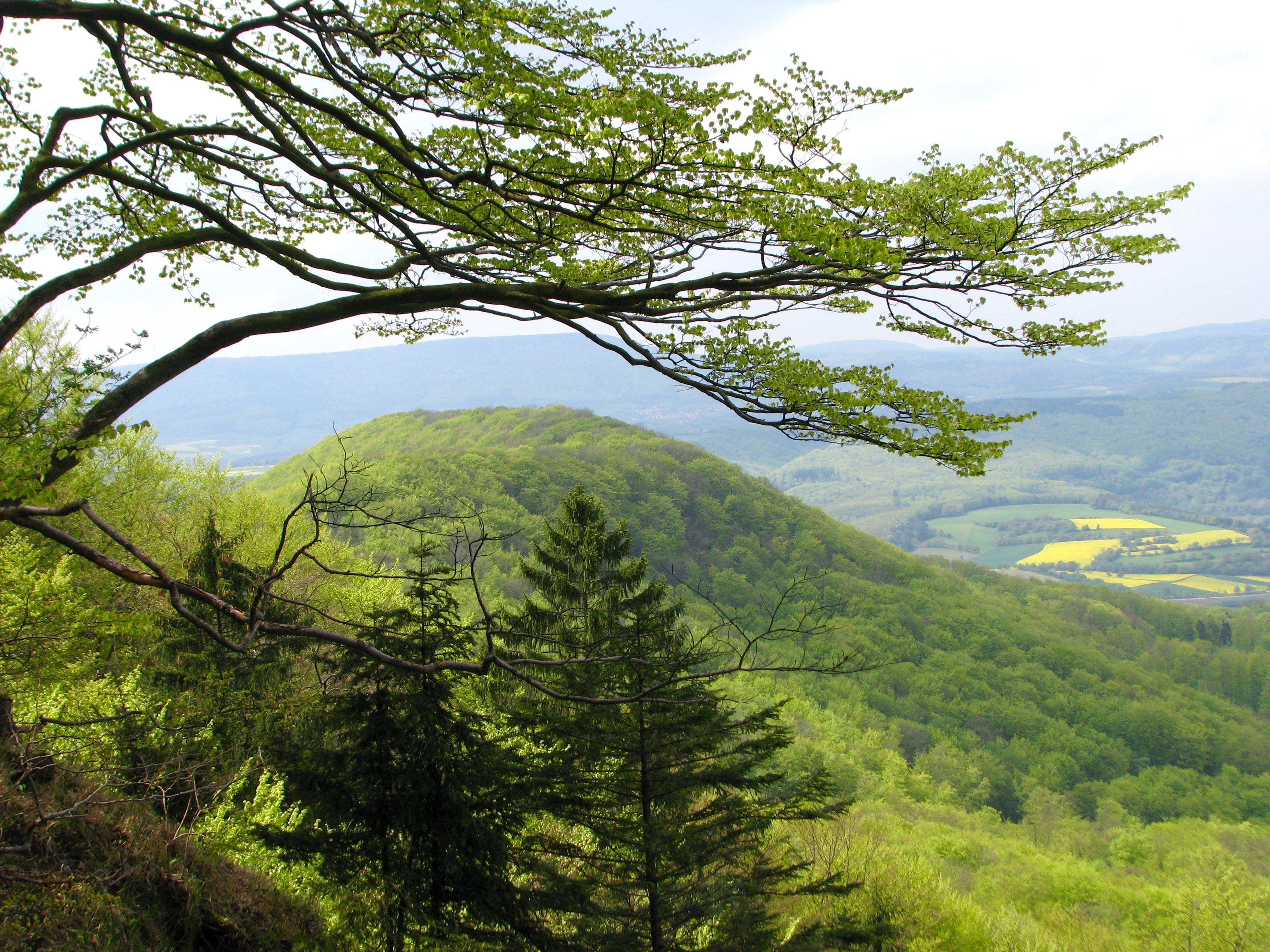 Blick von der "Schönen Aussicht" auf dem Hohestein nach Westen ins Werratal (im Mittelgrund der Hörnegrat, im Hintergrund der Hohe Meißner).